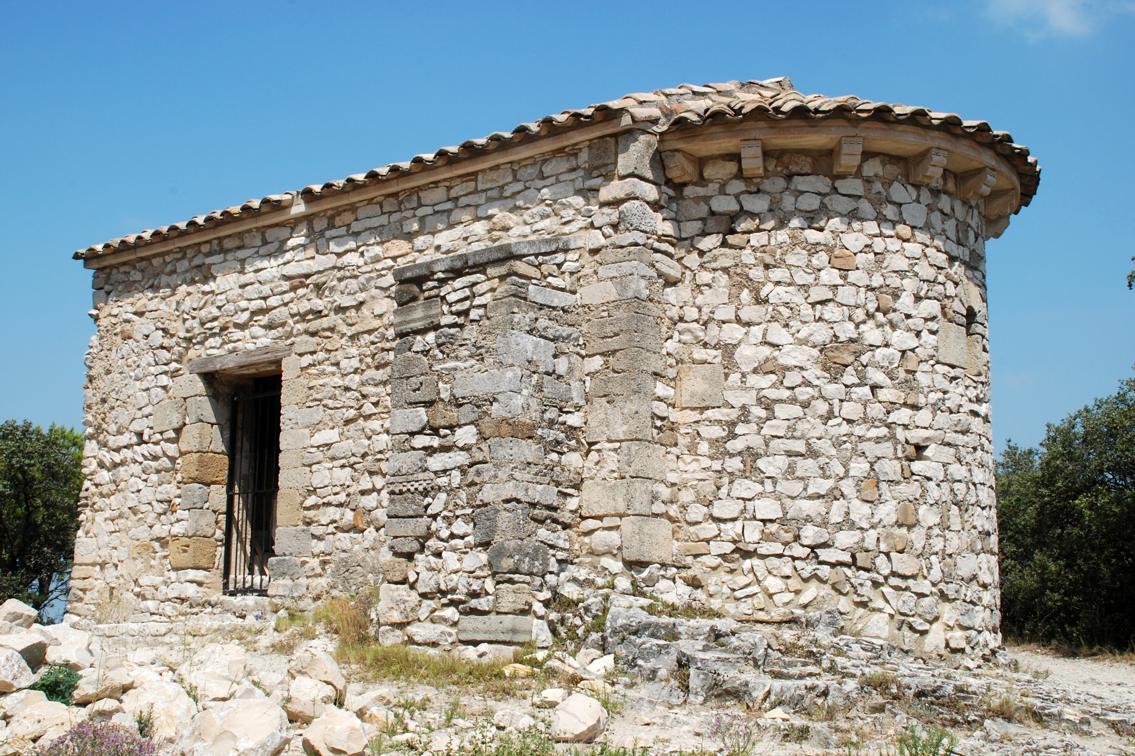 France - Provence - Vaucluse - Le Thor - Chapelle Saint-Pierre de Thouzon